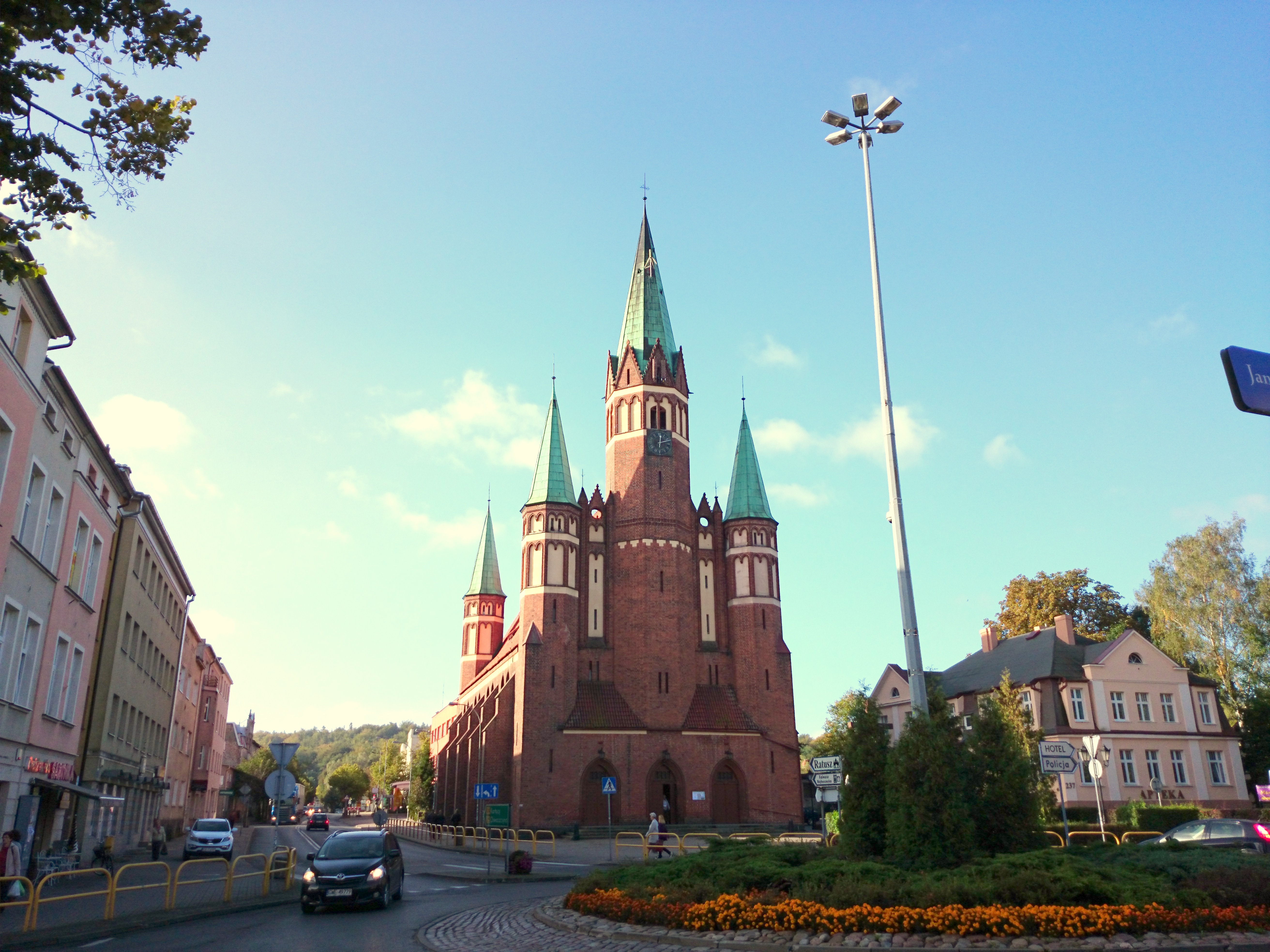 Wejherowo, kościół ewangelicki, ob, rzym.-kat. par. pw. św. Leona Wielkiego i Stanisława Kost…, 1907-1909